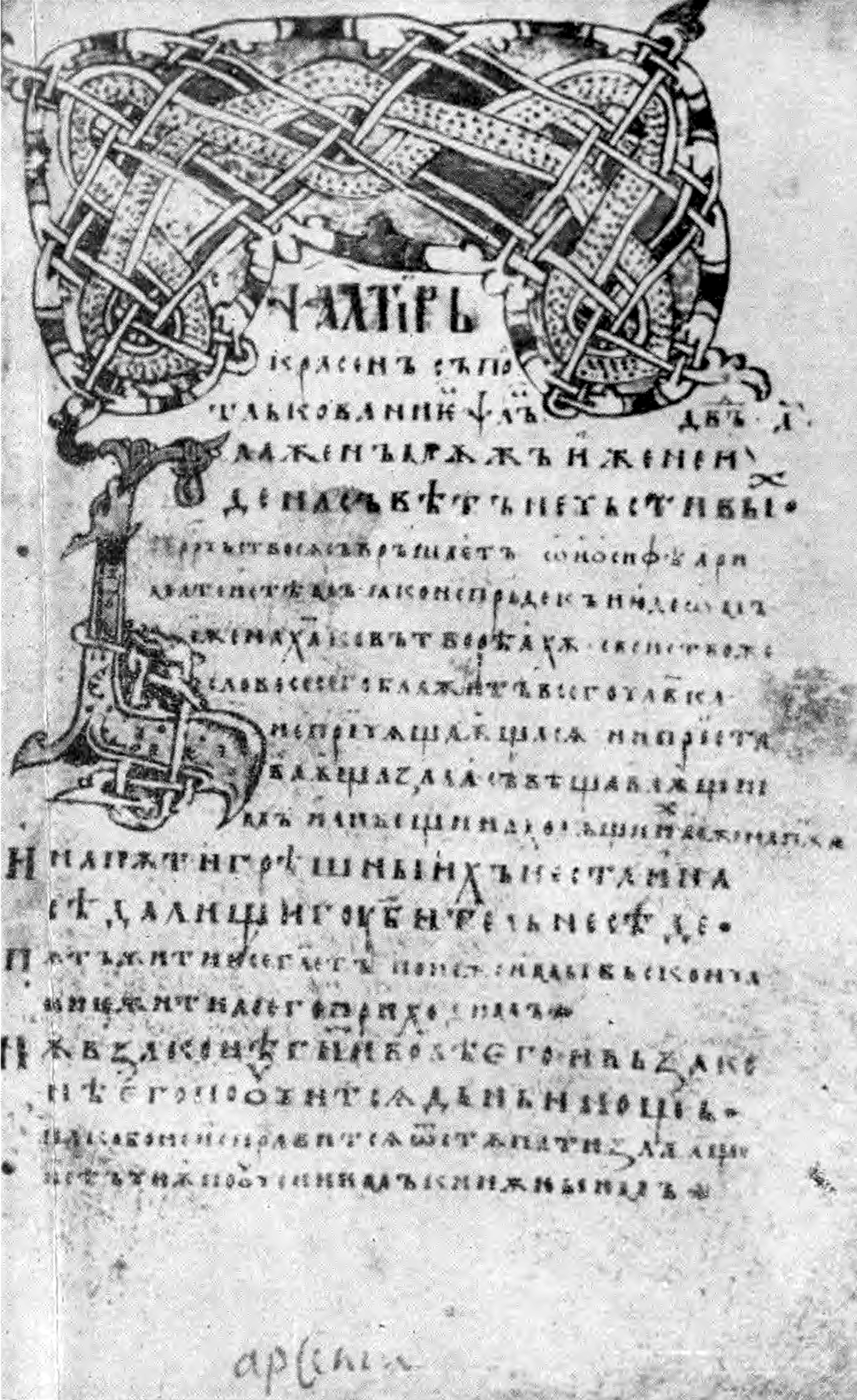 Погодинов Псалтир